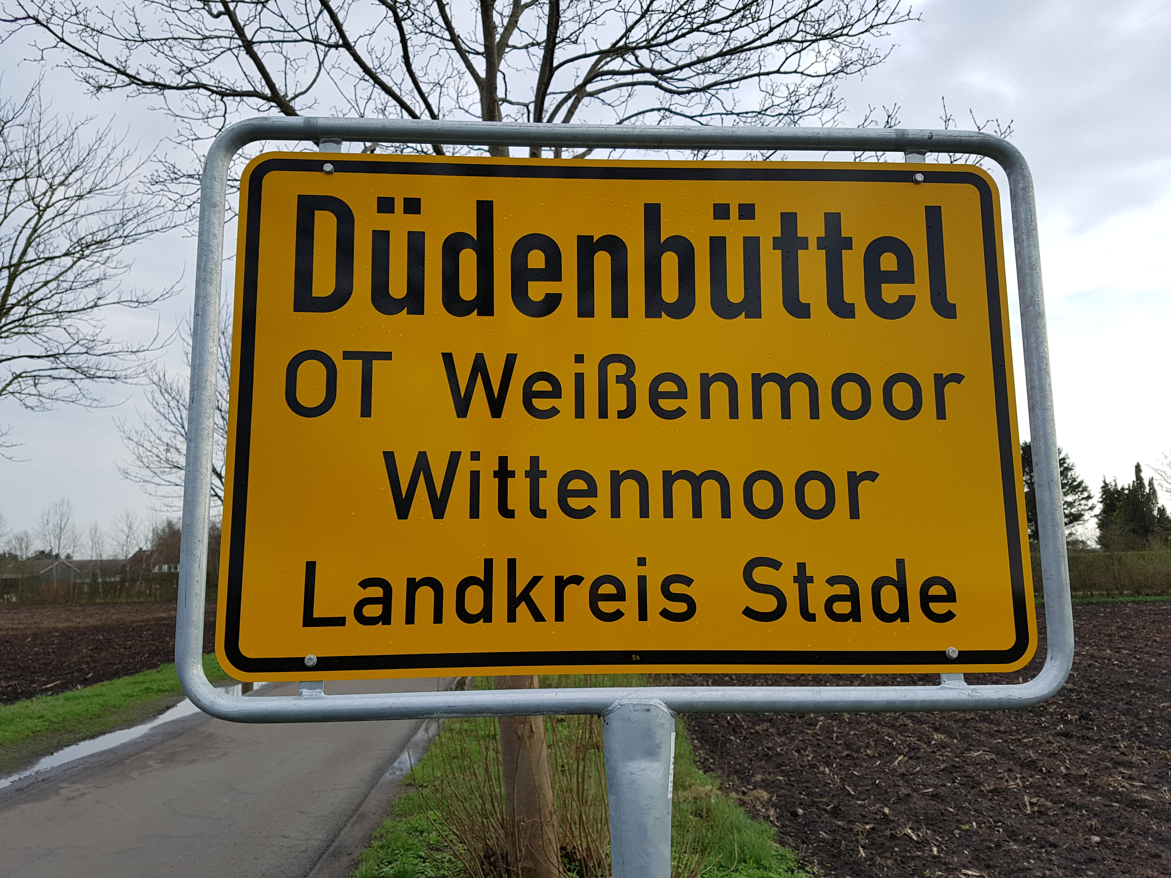 Oortsschild von Wittenmoor, Gemeen Düünbeudel, Landkreis Stood